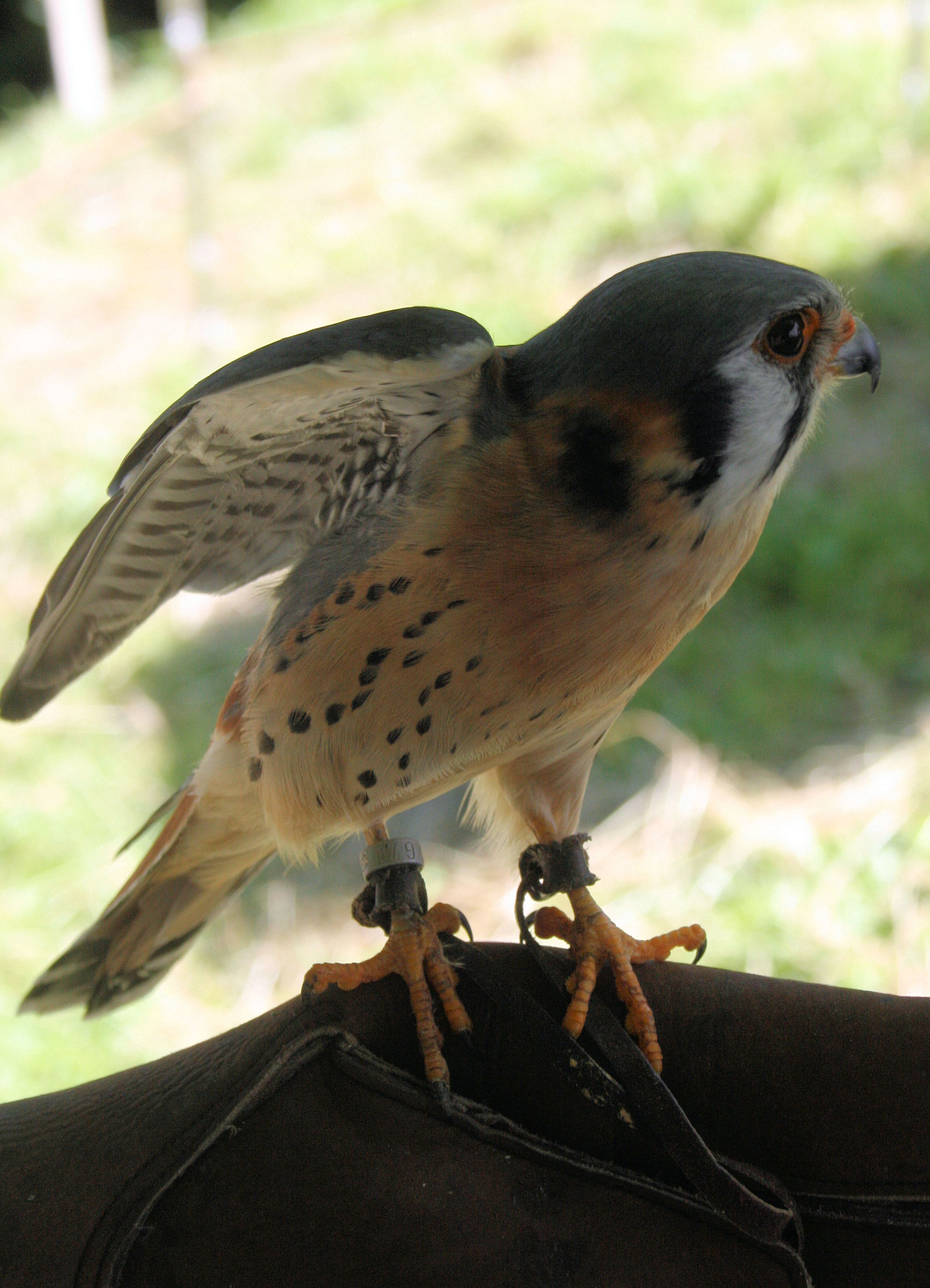 Buntfalke